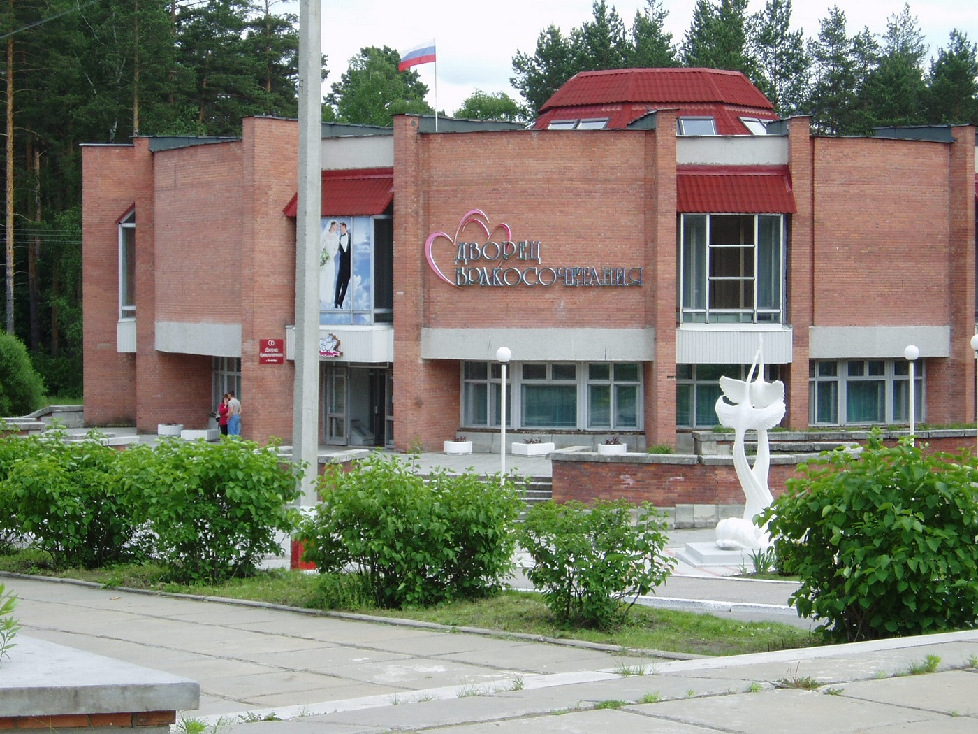 Димитровград, Дом бракосочетания